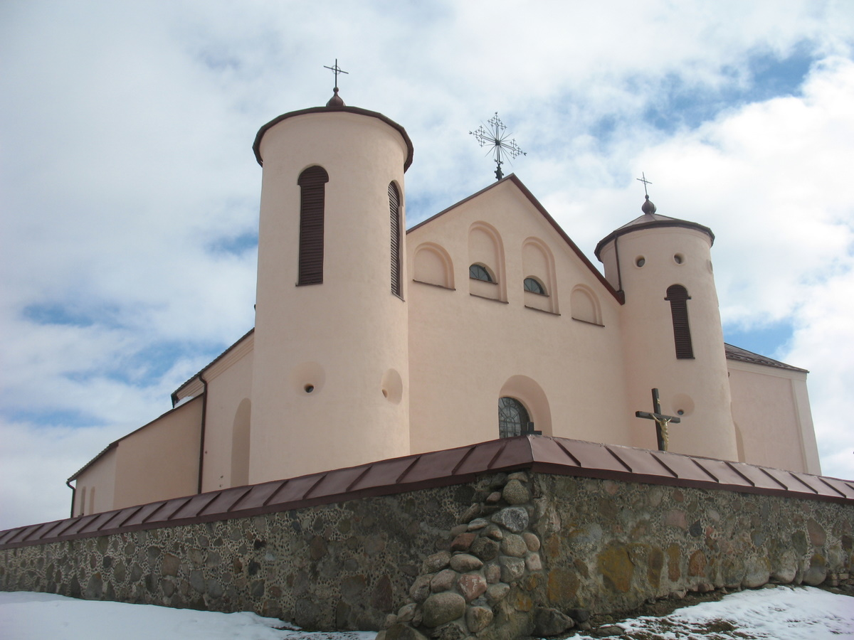 Беларуская (тарашкевіца): Камаі, Касьцёл Сьвятога Яна Хрысьцiцеля.